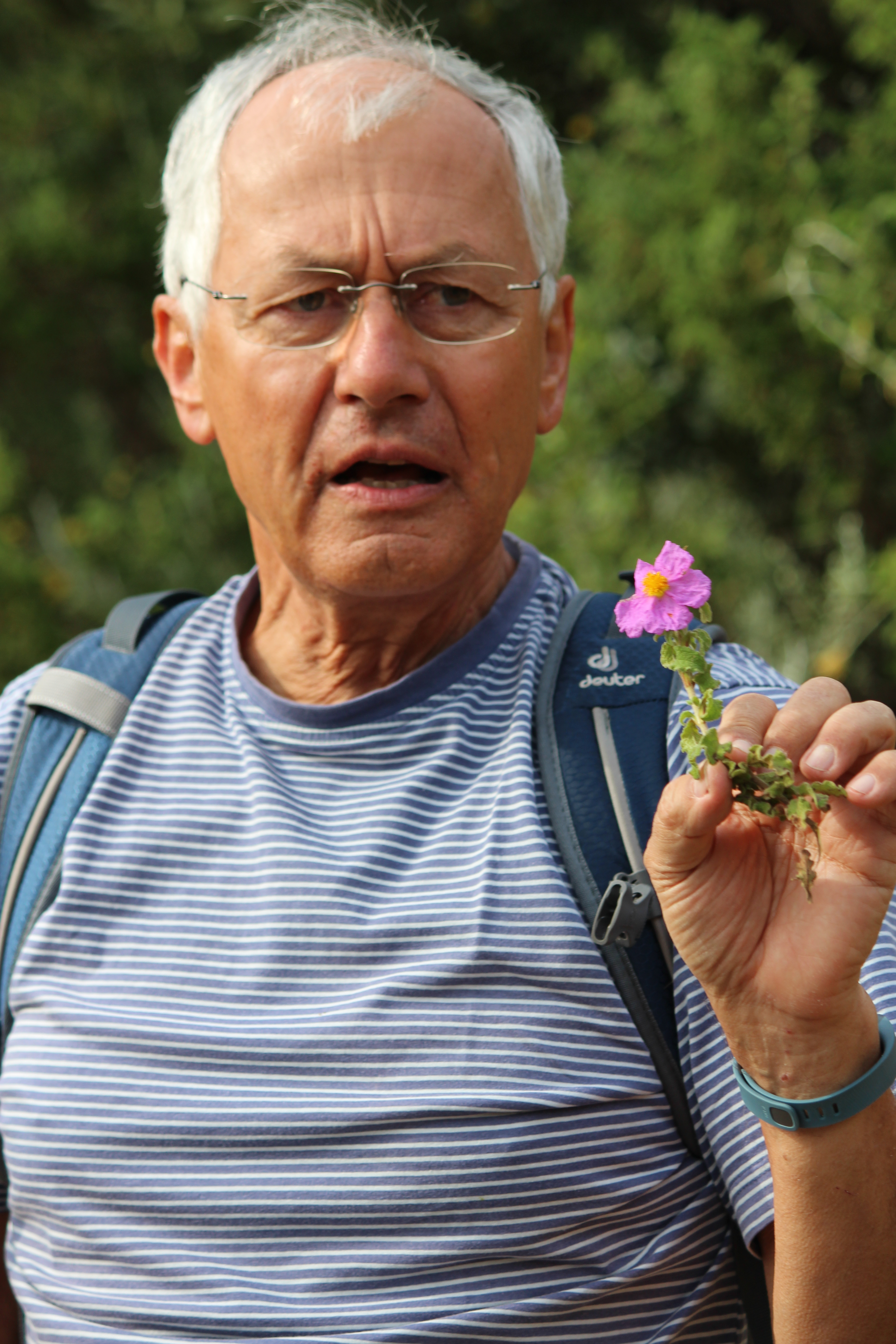 Prof. Körner mit Cistus incanus (Cistaceae) auf einer geobotanischen Exkursion für Studierende der Universität Basel (Samos 2014)